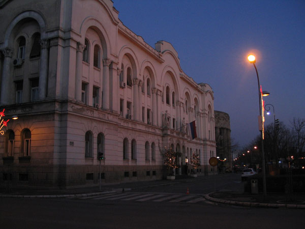 Banski dvor, Banja Luka, Republika Srpska (BiH)